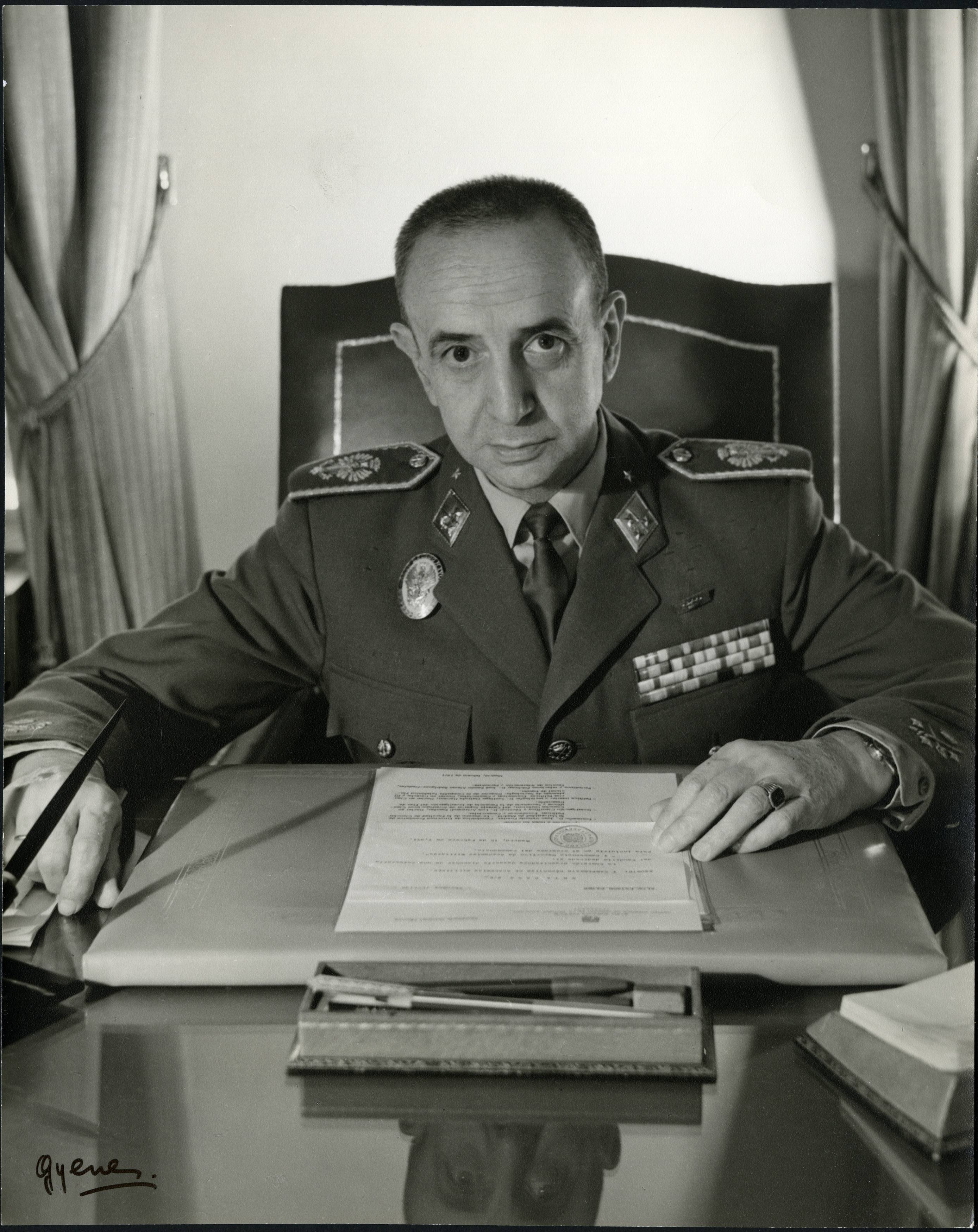 Retrato del tte. gral. Manuel Díez Alegría (1980), de Gyenes